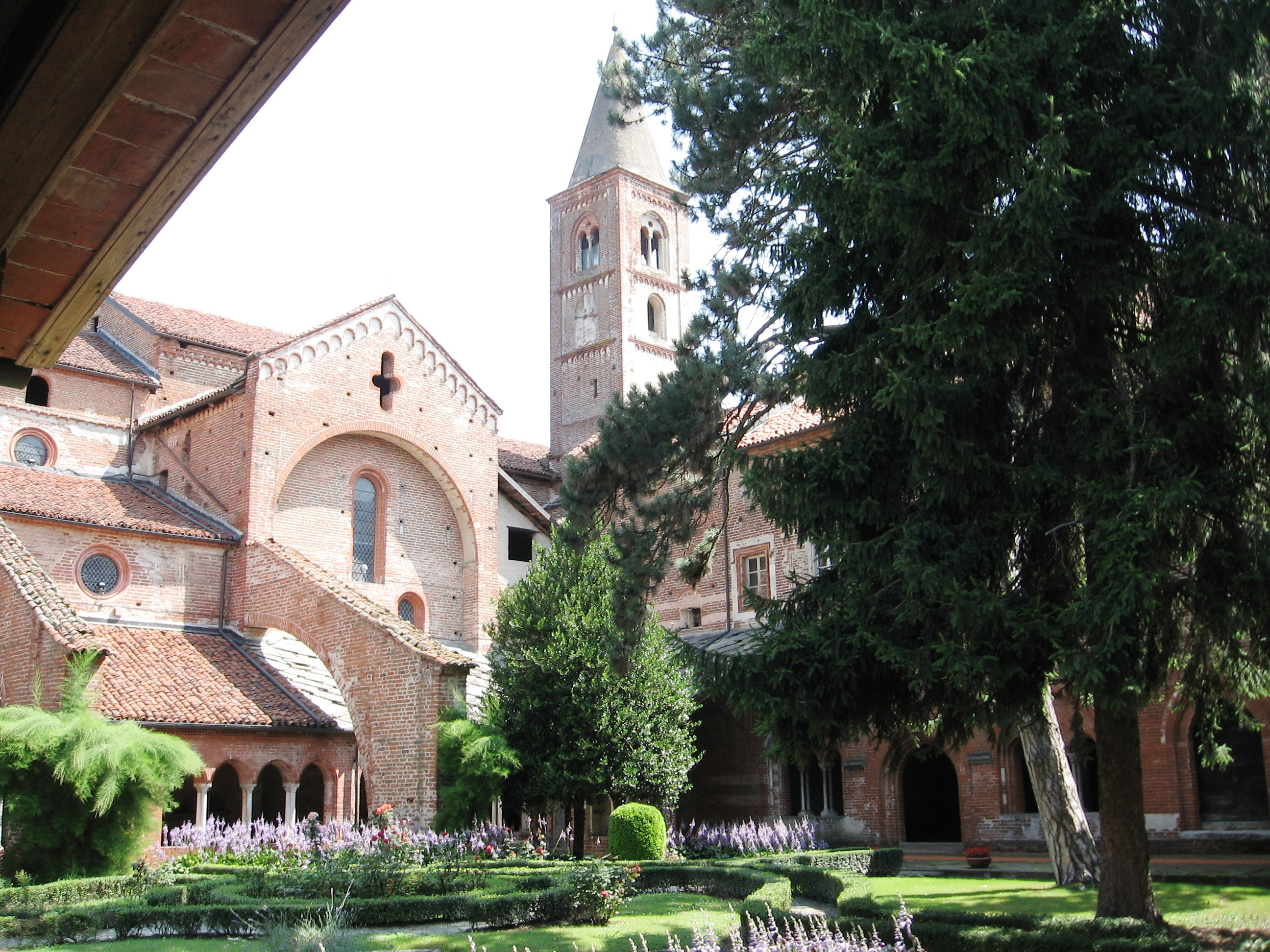 Revello. Cuneo. La Chiesa Abbaziale di Staffarda vista dal chiostro.